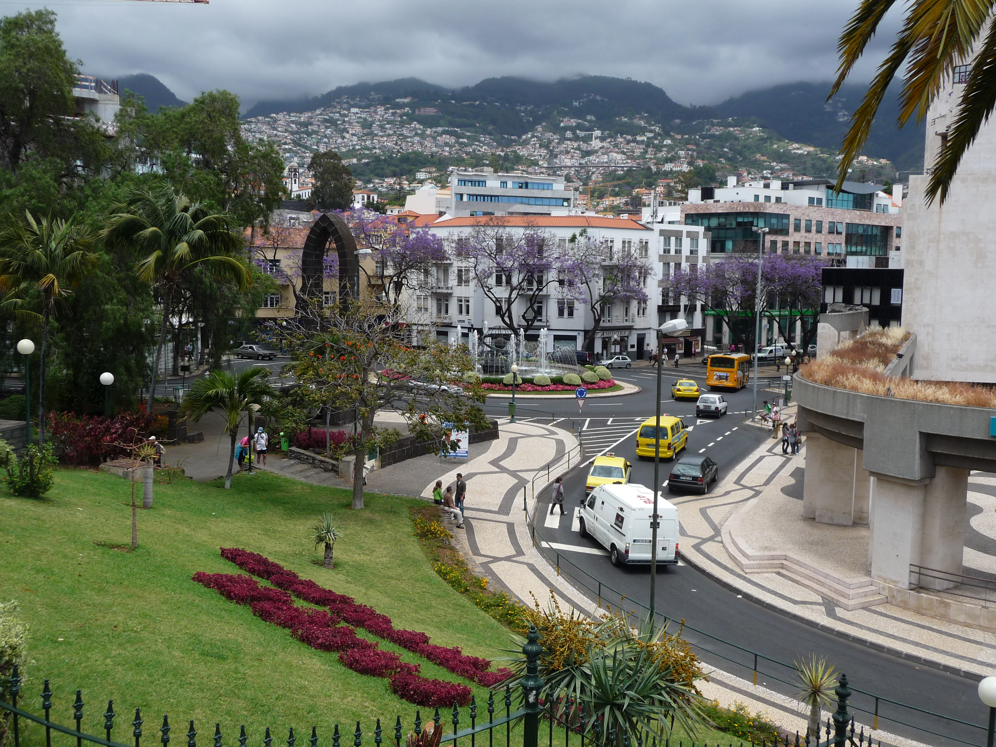 Funchal – Blick nach Norden - 5 09